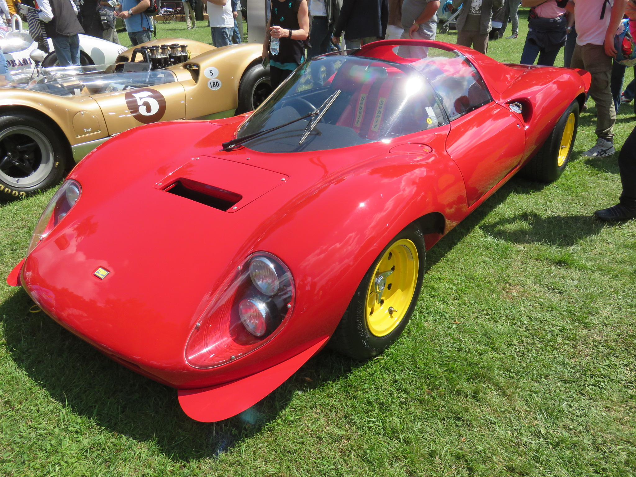 Ferrari Dino 206S, Concours d'élégance Villa d'Este 2015